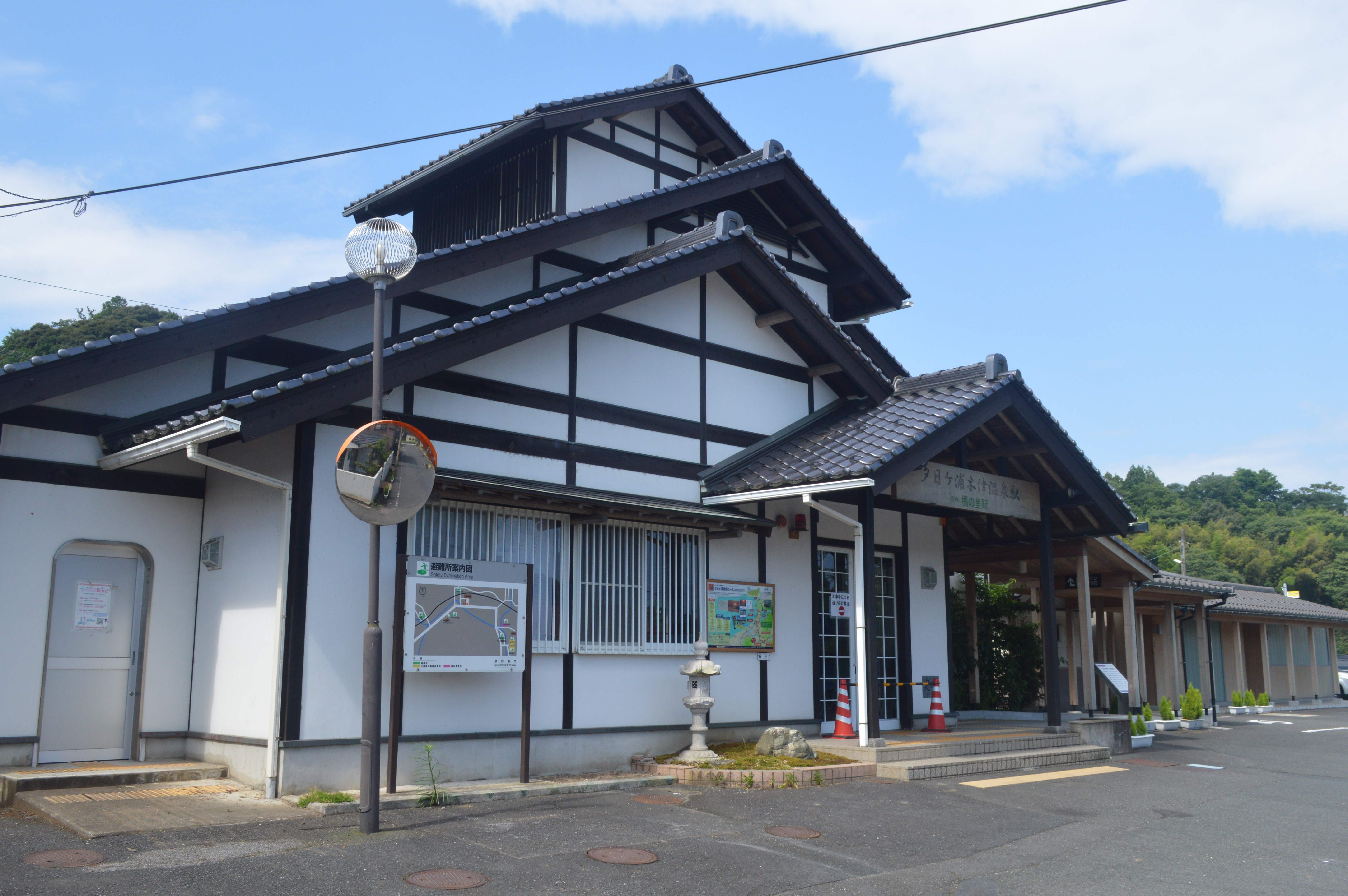 京都府京丹後市にある京都丹後鉄道宮津線（宮豊線）夕日ヶ浦木津温泉駅。